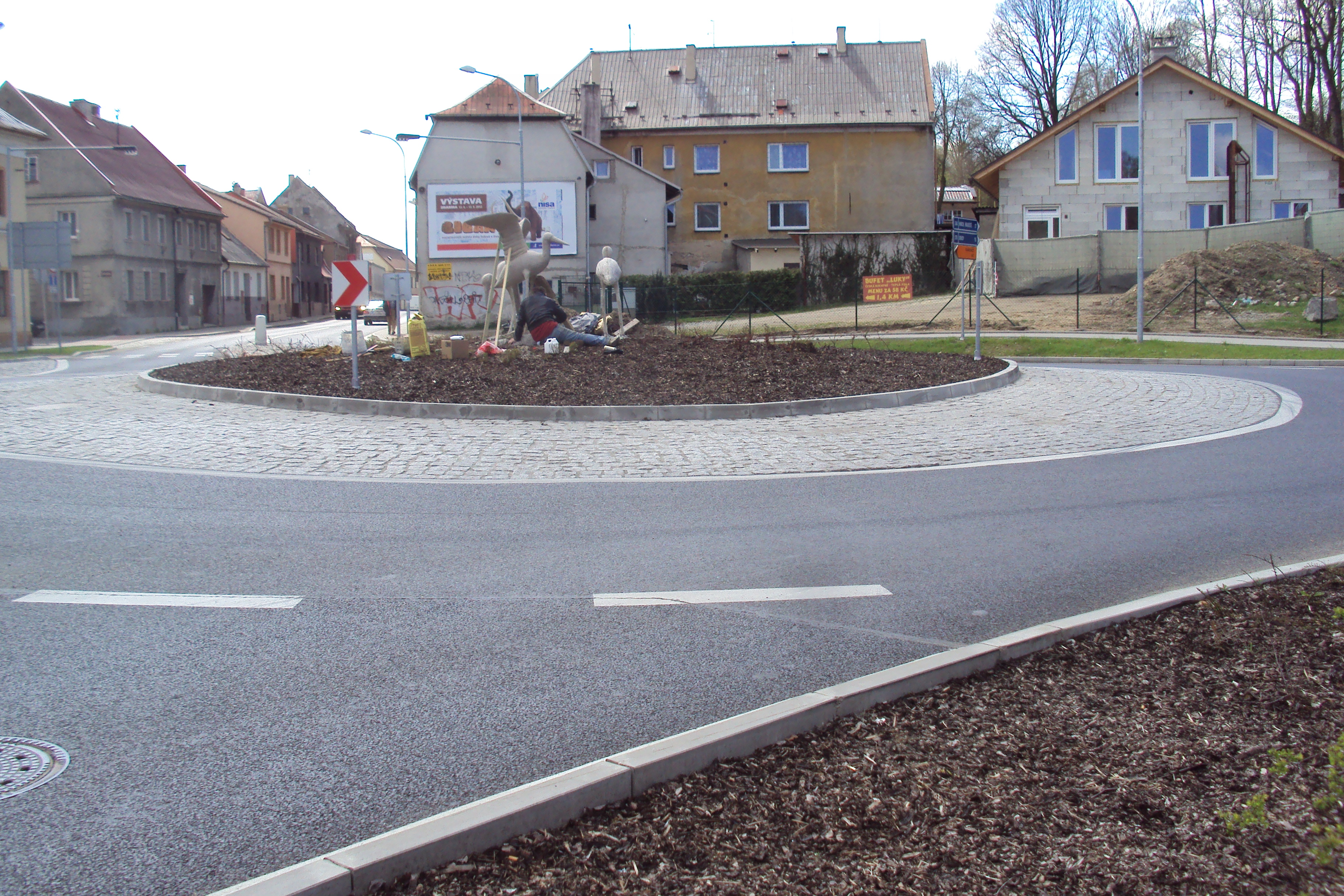 Česky: Nová kulatá křižovatka na Kozinově něměstí, Mimoň IV